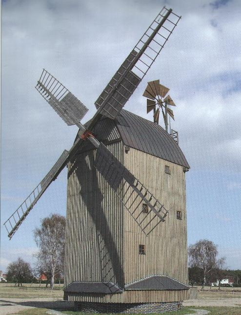 Paltrockwindmühle Oppelhain, Deutschland.